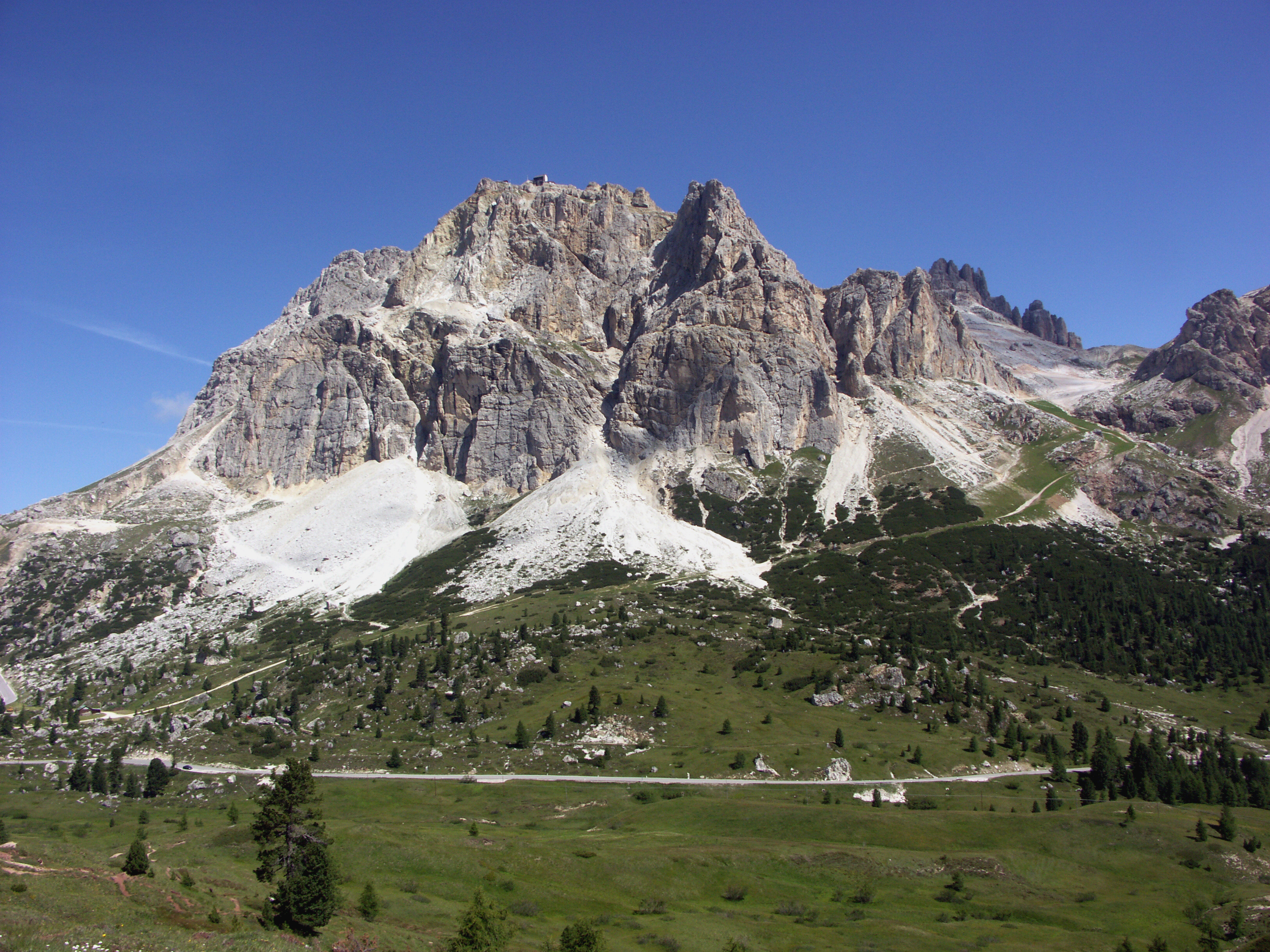 Italien, Südtirol, Kleiner Lagazuoi (Lagazuoi piccolo) vom Fazarego-Pass aus